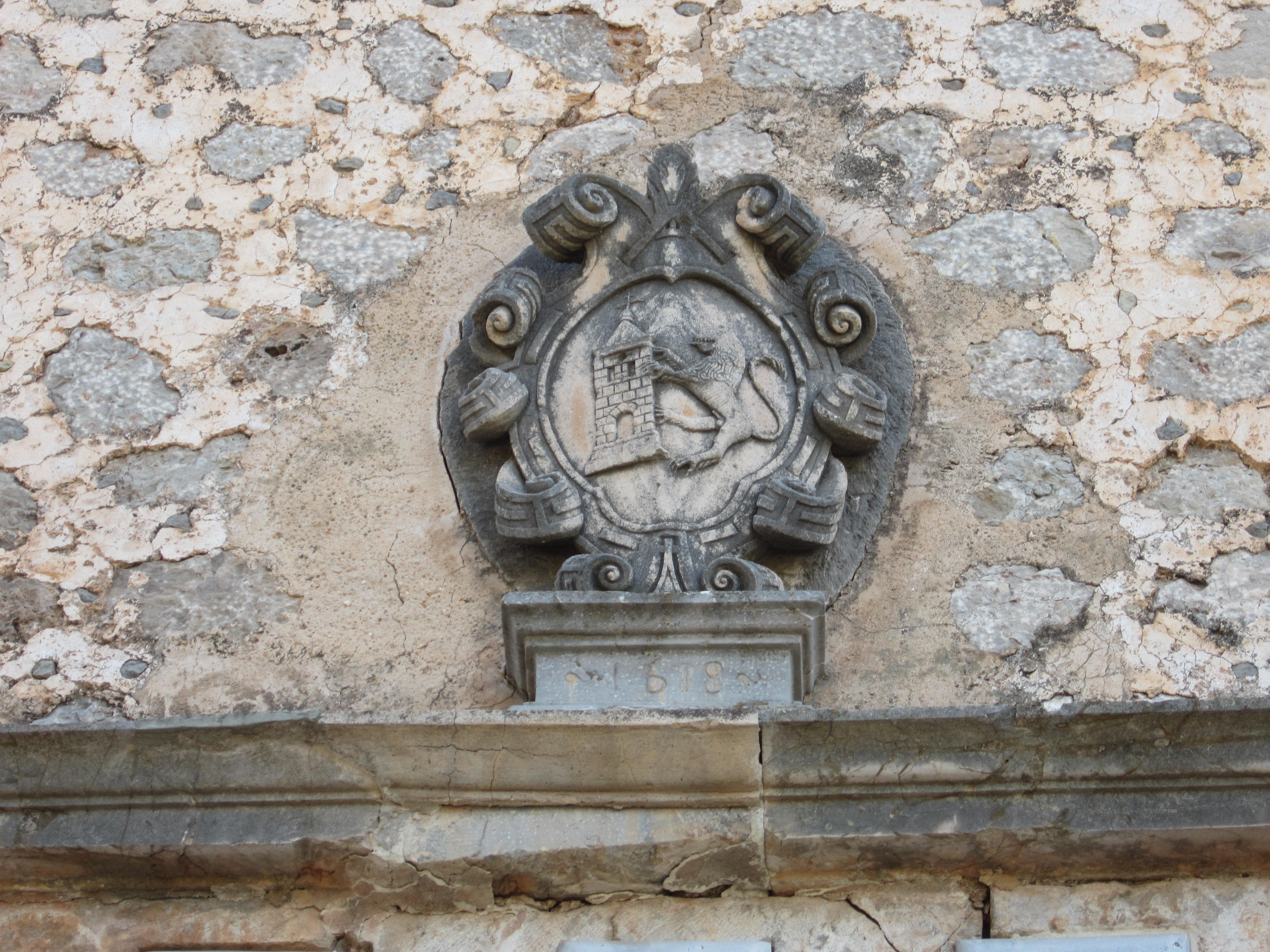 Possesió de can Fussimany, a Deià ( Mallorca). Detall superior de la porta d'entrada principal